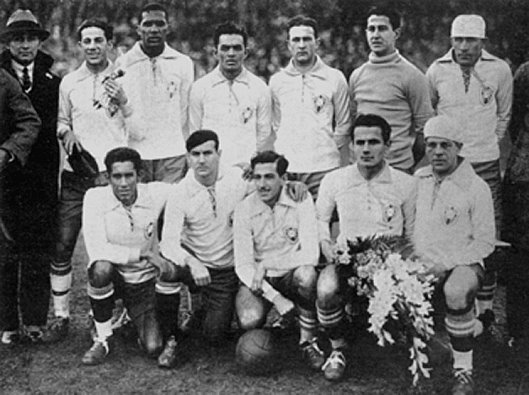 Association Football - World Cup 1930 - Brazil - in the fist match - na primeira partida Back/Em pé: Píndaro de Carvalho (Técnico), Brilhante, Fausto, Hermógenes, Itália, Joel e Fernando. Front/ajoelhados: Poly, Nilo, Araken, Preguinho e Teóphilo.